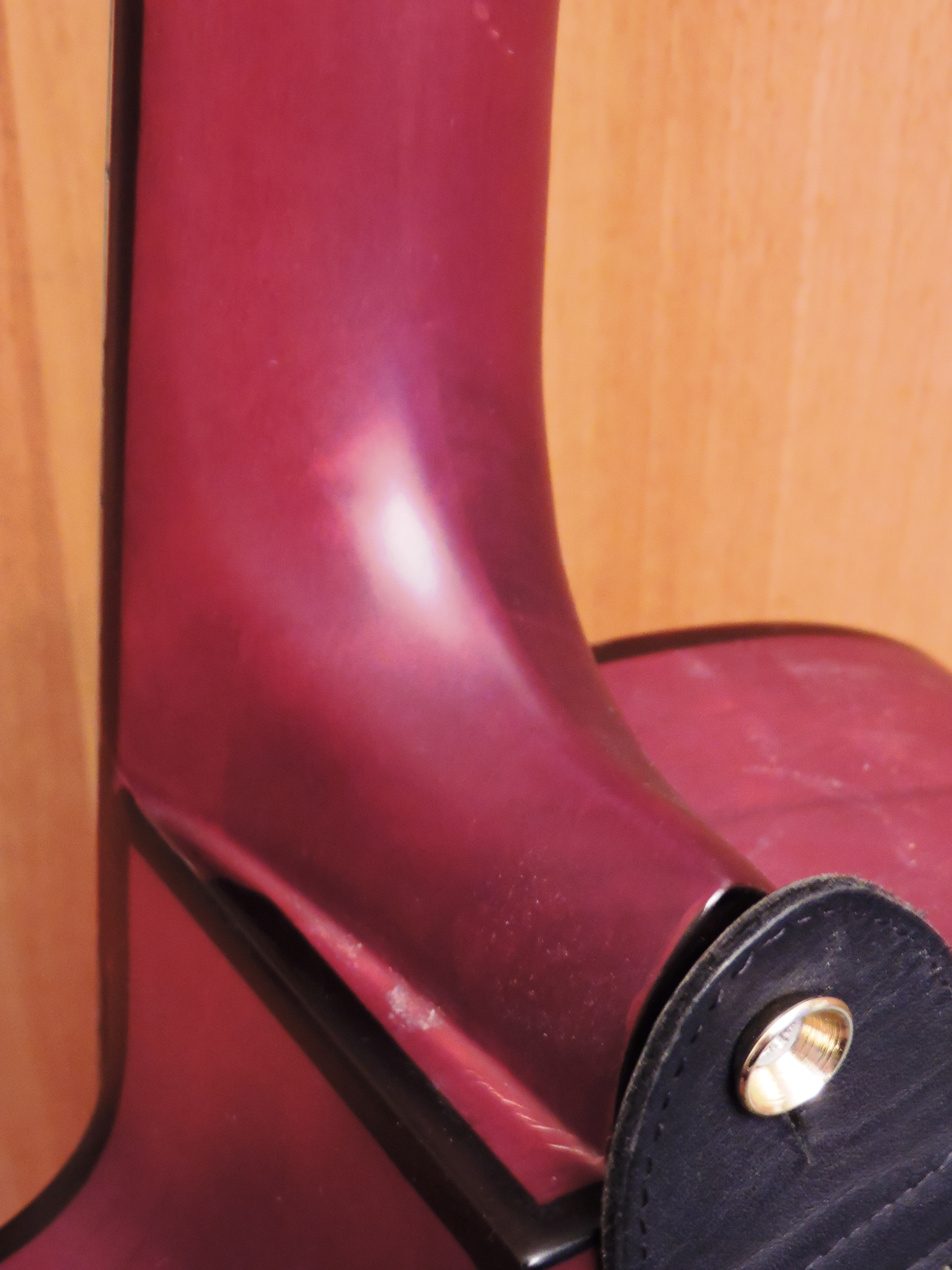 Глухой гриф гитары и пуговка, на которой укреплён ремень